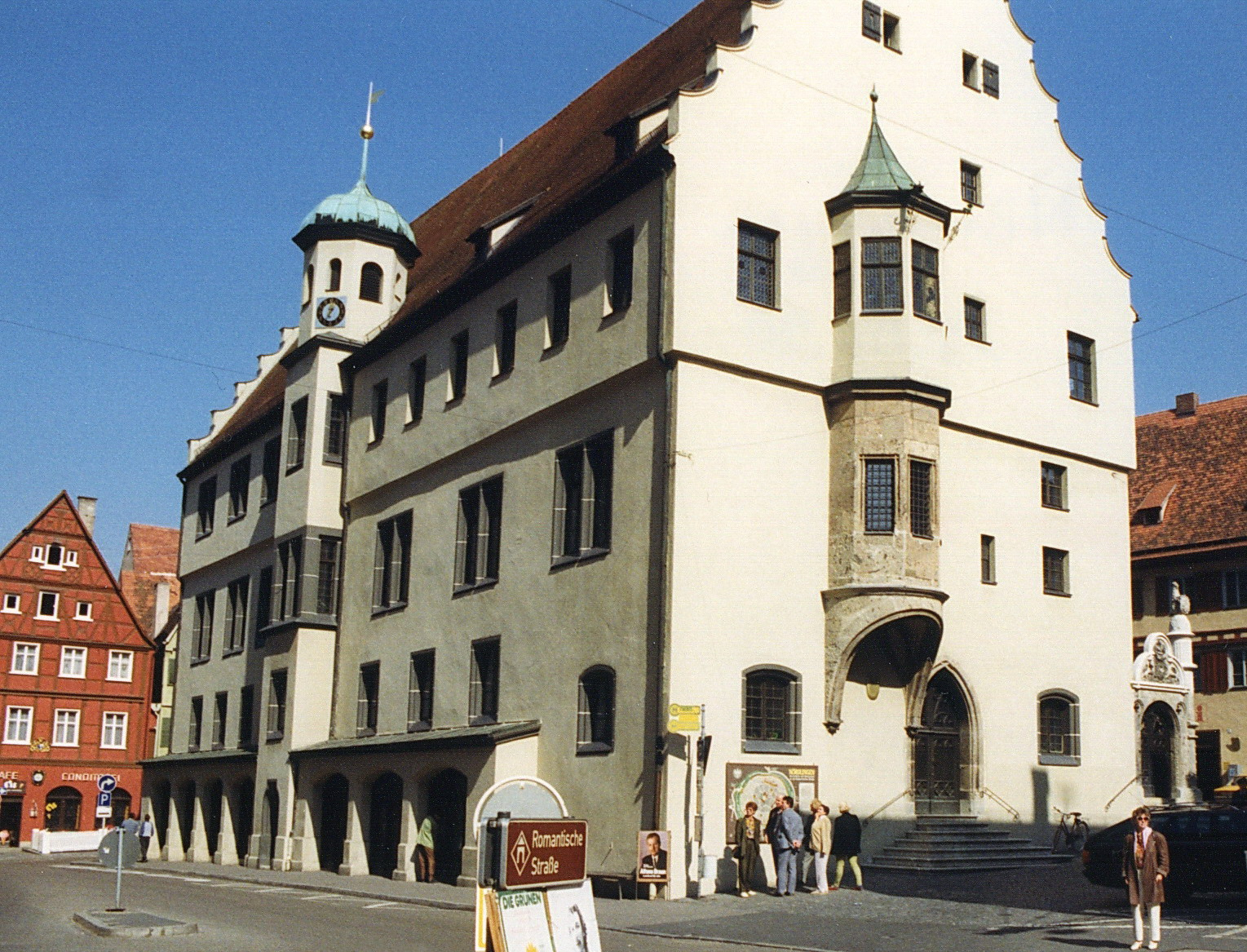 Nördlingen, Rathaus